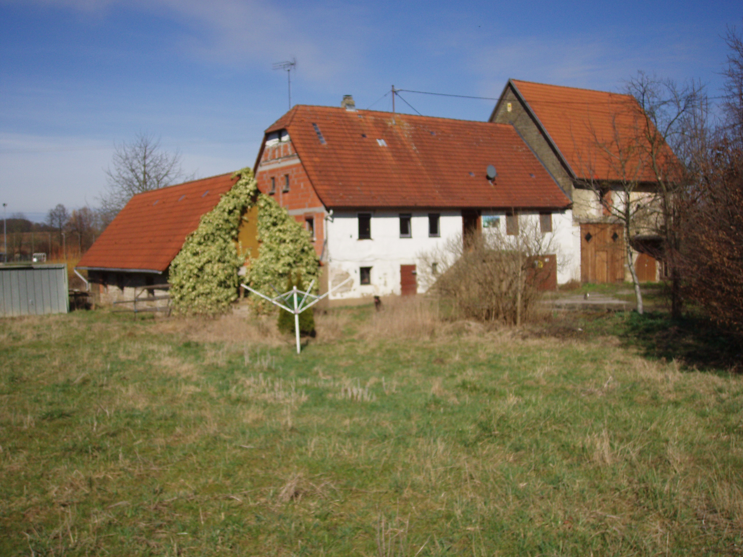 Obere Mühle in Kirchardt-Berwangen, Zustand 2008